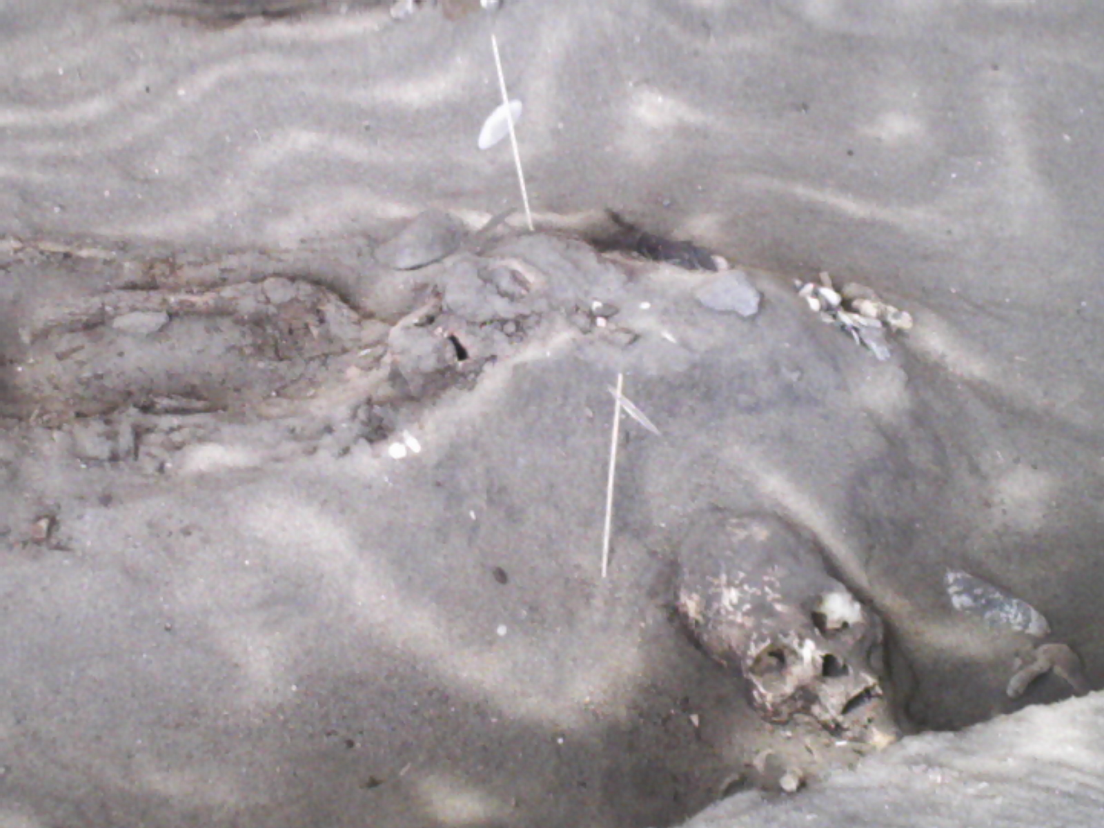 Original caption: En Arica están las momias más antiguas del mundo, pertenecen a la Cultura Chinchorro con diez mil años de antigüedad. Hace relativamente poco tiempo se encontraron en un sitio en el centro de la ciudad nuevos cuerpos momificados, corresponden a un periodo tardío de la cultura Chinchorro, así que son un poco más "jóvenes", tienen aproximadamente 9.500 años. Estas imágenes son de este lugar que pronto se convertirá en un museo in situ, para mi fue muy sobrecogedor estar ahí. Los chinchorros preparaban esmeradamente a sus muertos para que continuaran el camino hacia otra vida y lo lograron, porque después de diez mil años están presentes...